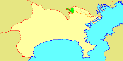 Map of Asao-ku, Kawasaki, Kanagawa-prefecture, Japan